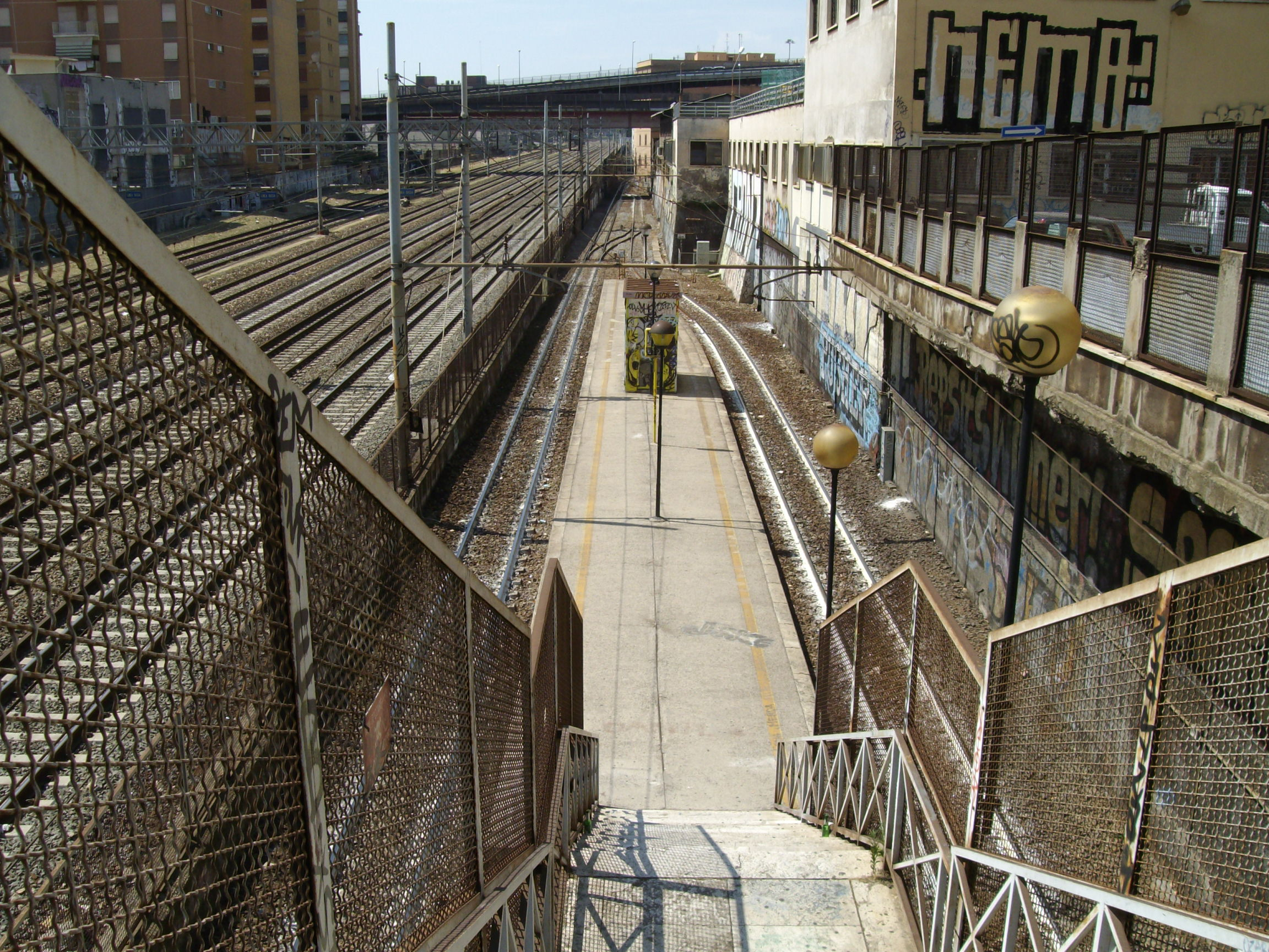 La fermata Ponte Casilino della ferrovia Roma-Giardinetti